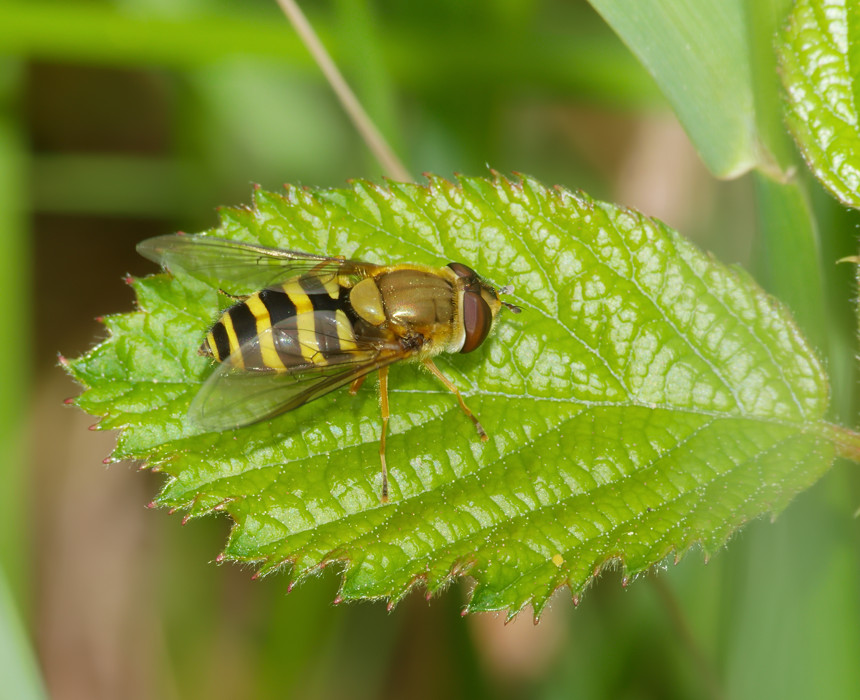 Gemeine Garten-Schwebfliege - Syrphus ribesii, Weibchen. Aufgenommen in Buchklingen (Odenwald), Hessen, Deutschland.